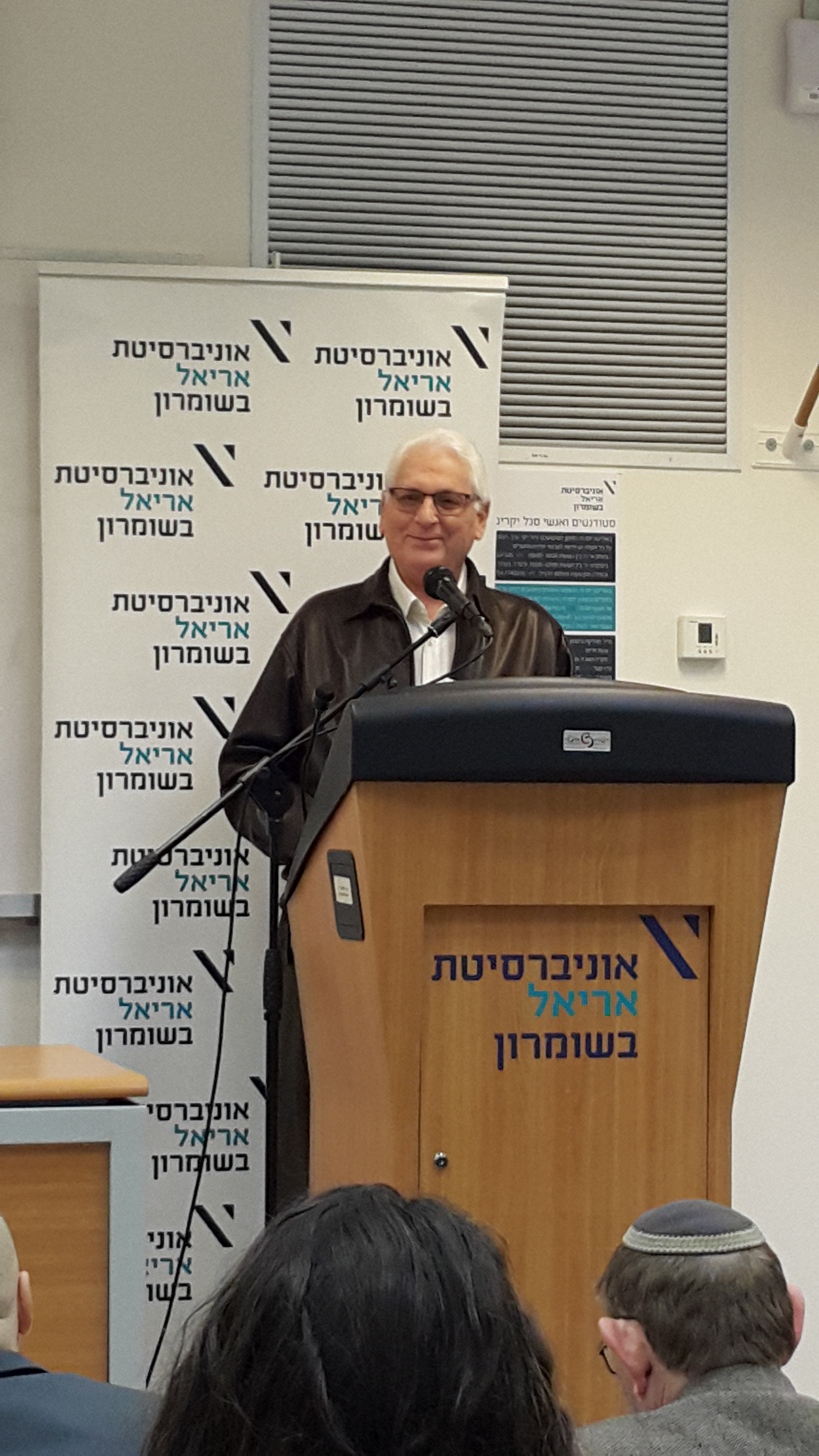 השגריר (לשעבר) יצחק לבנון